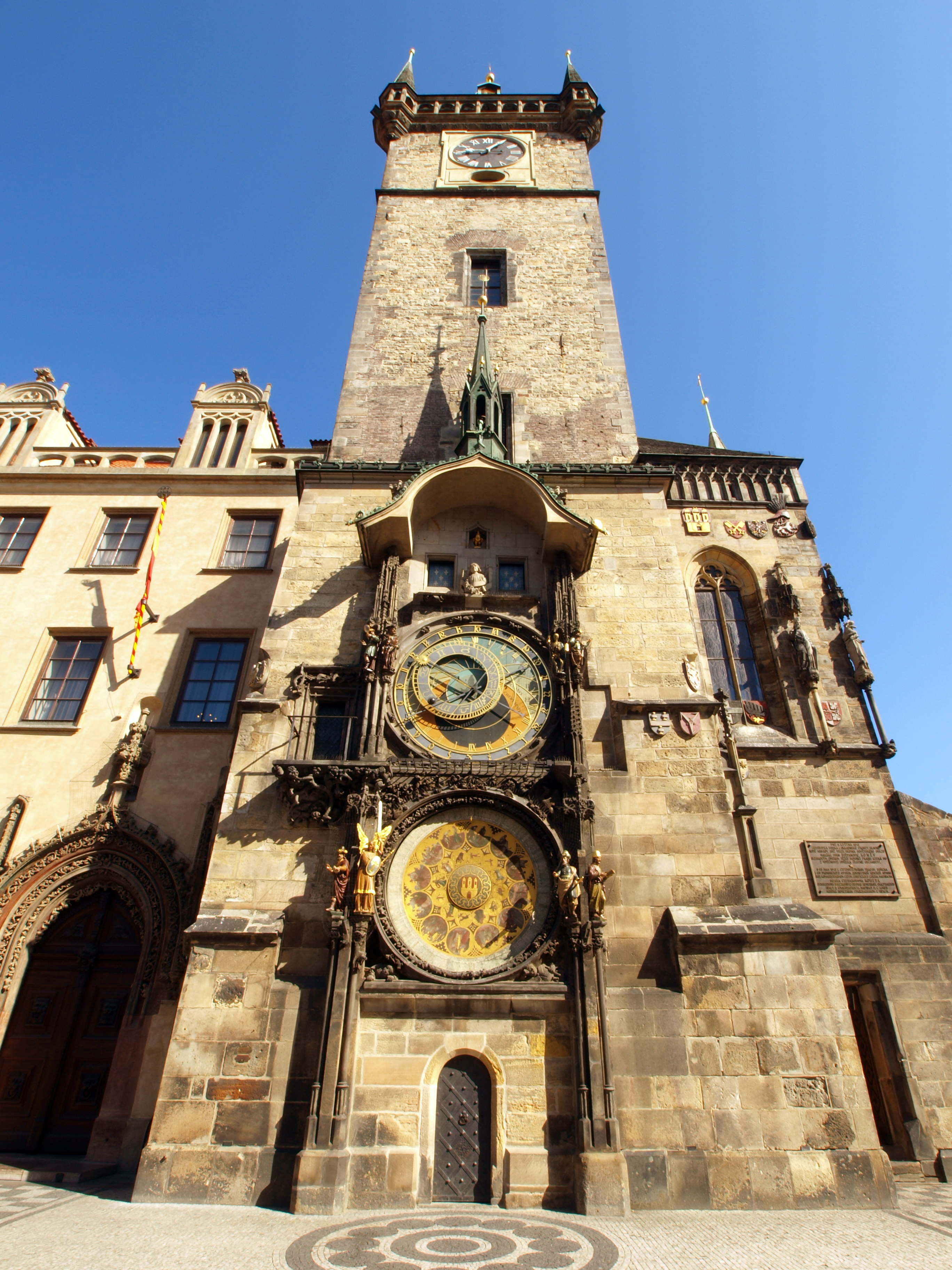 Prague Astronomical Clock, Prague Orloj